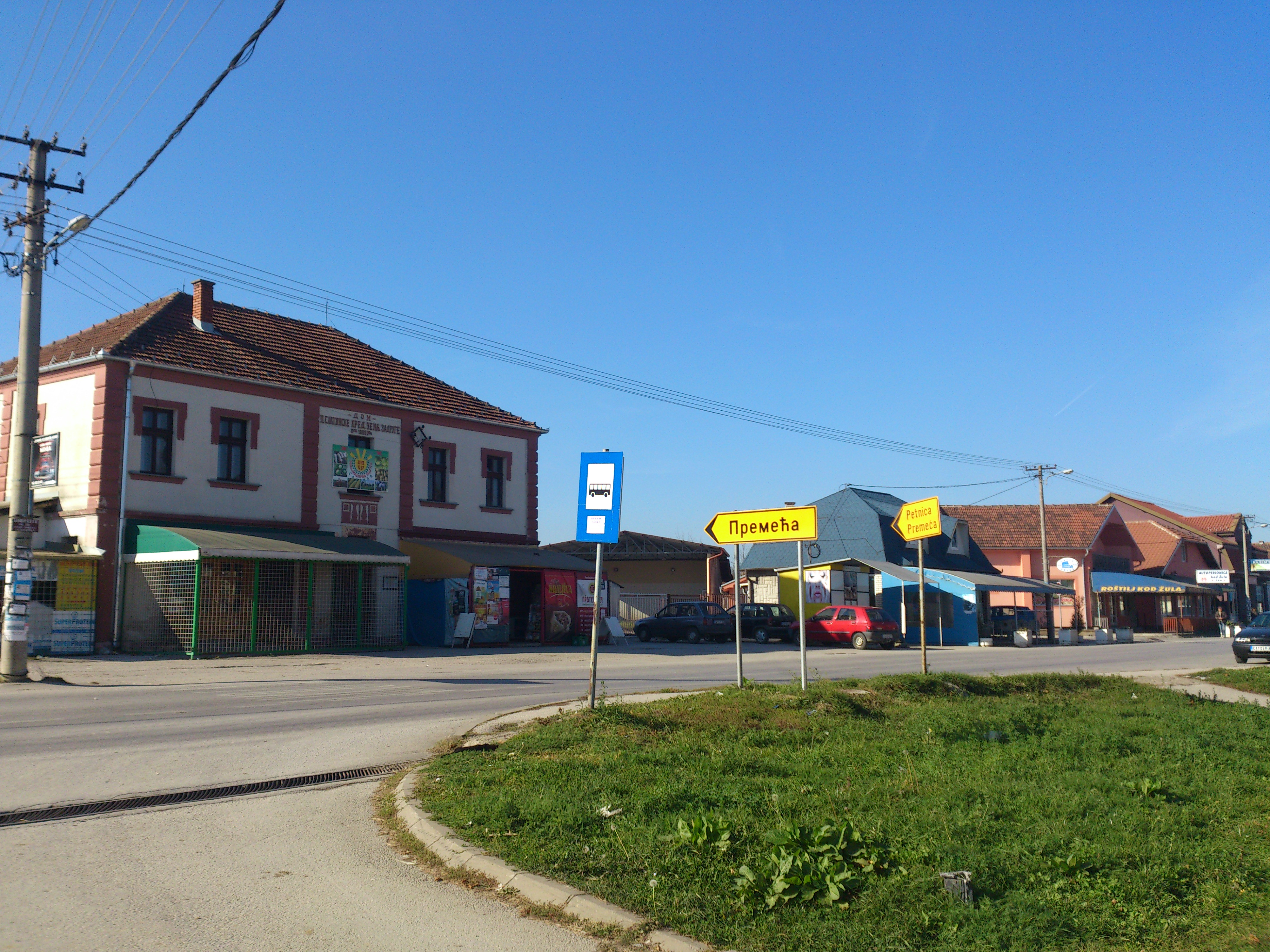 Варошица у Слатини код Чачка.